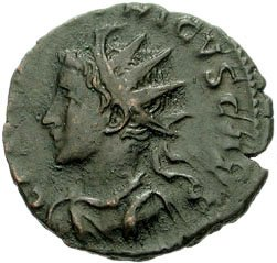 Portret van caesar Tetricus II, zoon van de Gallo-Romeinse keizer Tetricus I, op een antoninianus (1.8g) geslagen te Trier in 273-274.